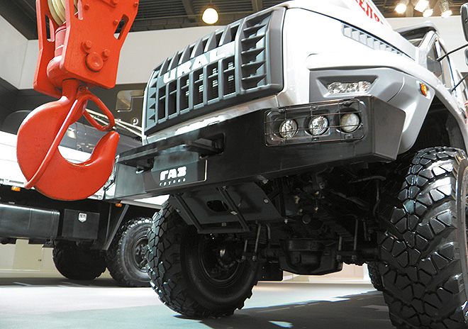 Международный грузовой автосалон COMTRANS'15, сентябрь 2015 года, г. Москва